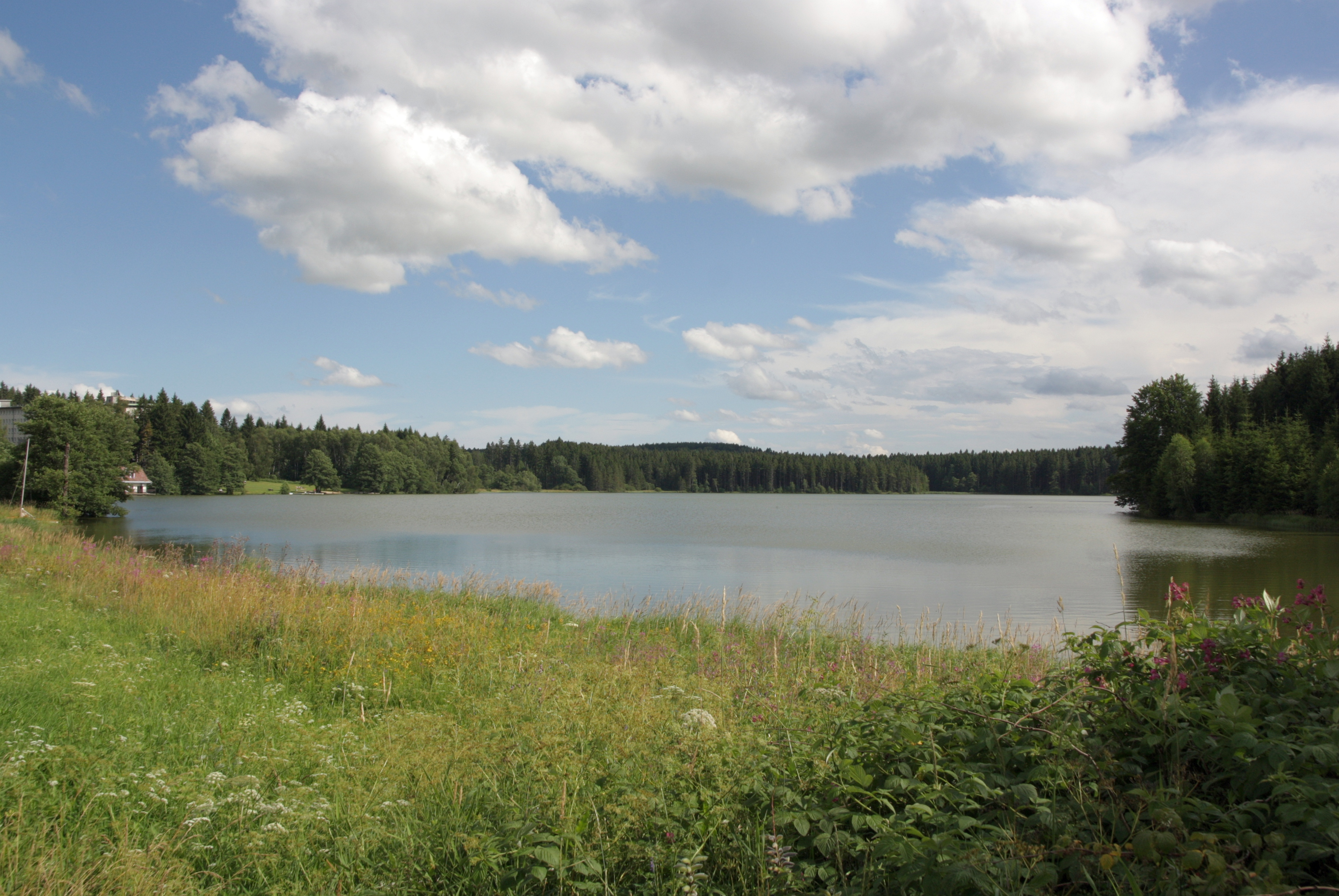 Fryšava pod Žákovou horou - Medlovský rybník, pohled od severu